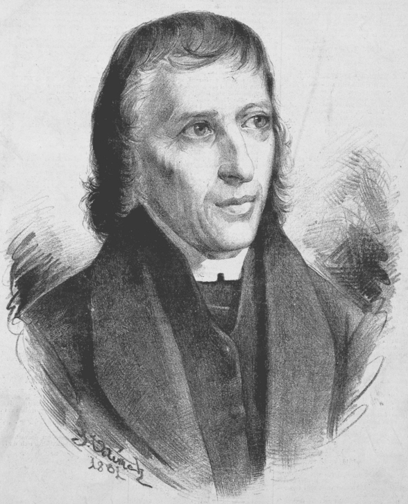 Portréty osobností od Jana Vilímka